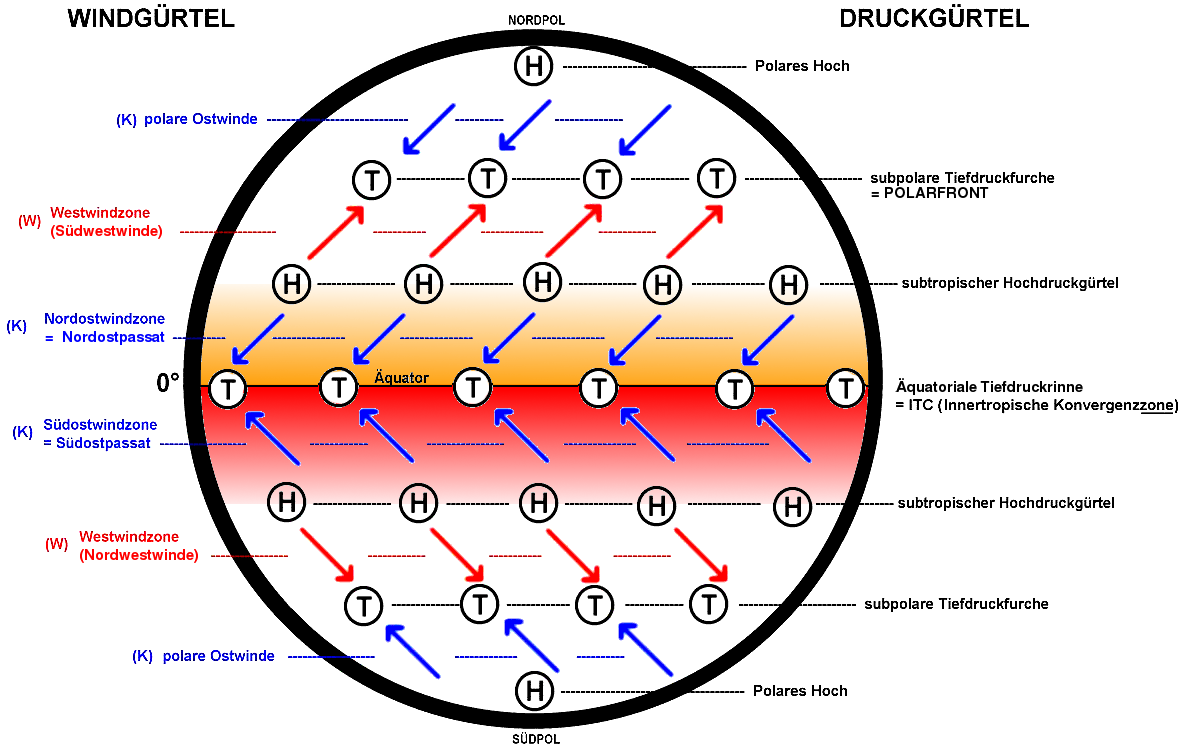 Schematische Darstellung der Passatzonen im Wind- und Druckgürtelsystem der Erde.